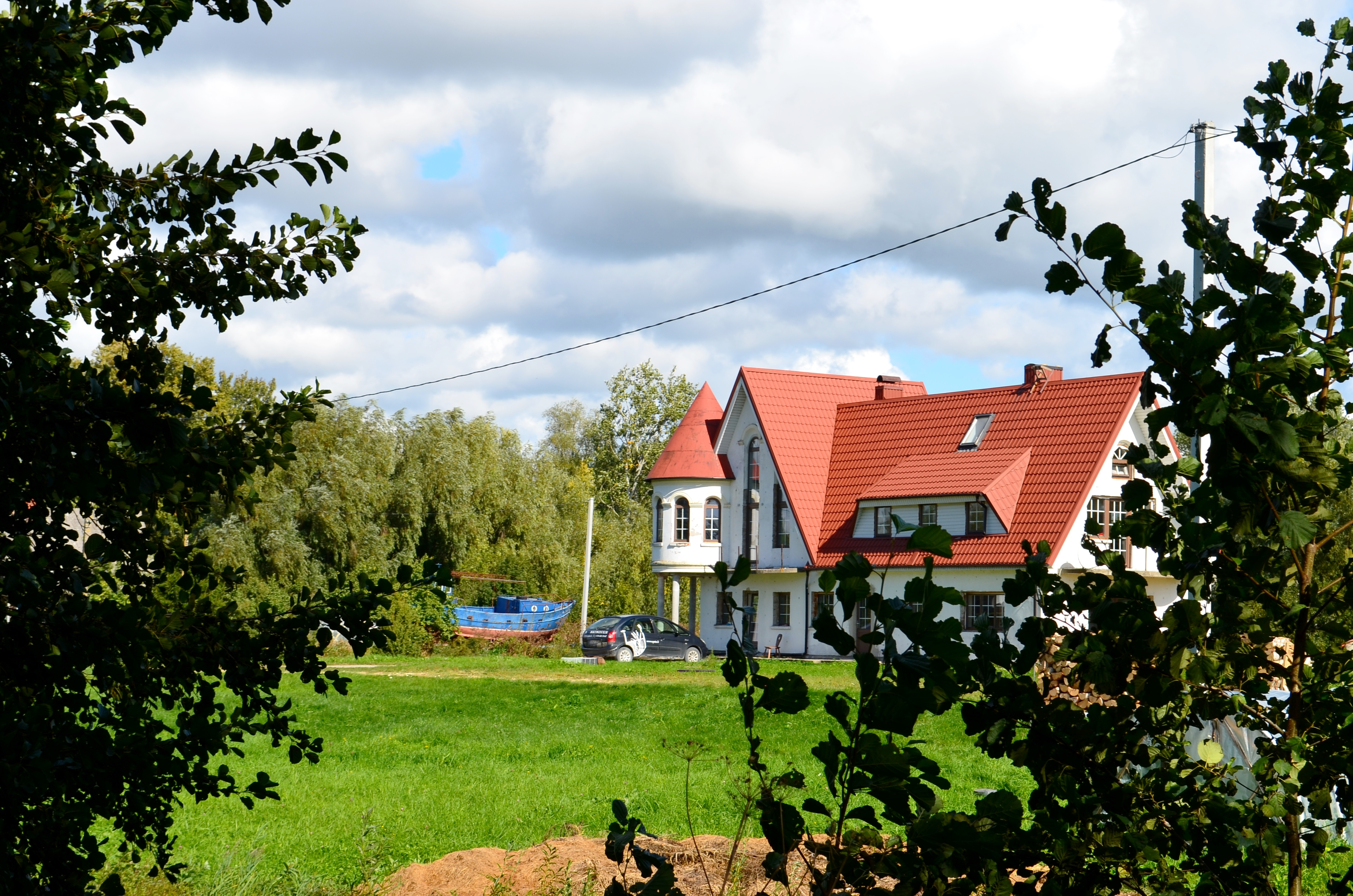 Žemaitėška: Šīša, Šėlotės rajuons